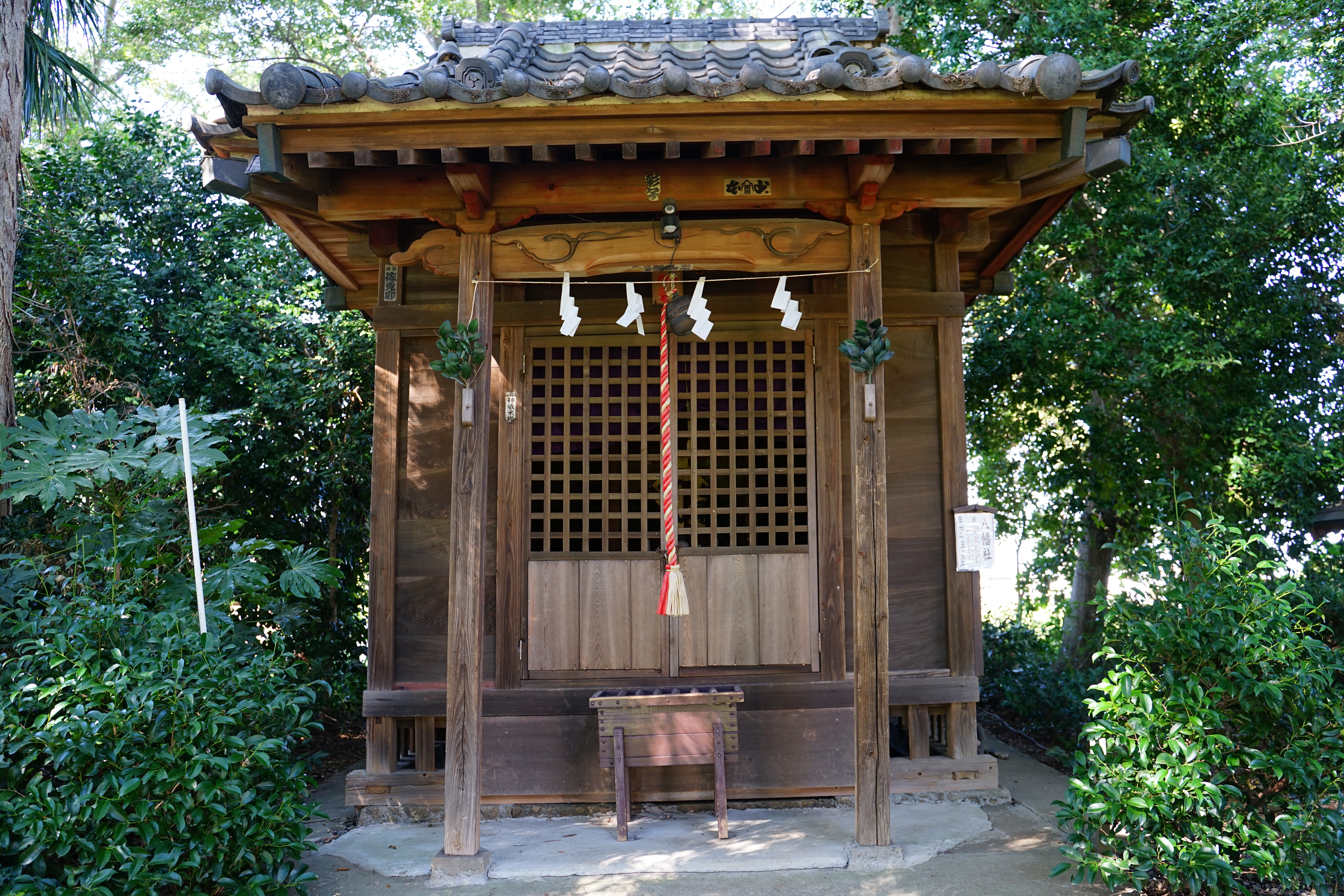 姫宮神社（埼玉県宮代町）境内社の八幡宮